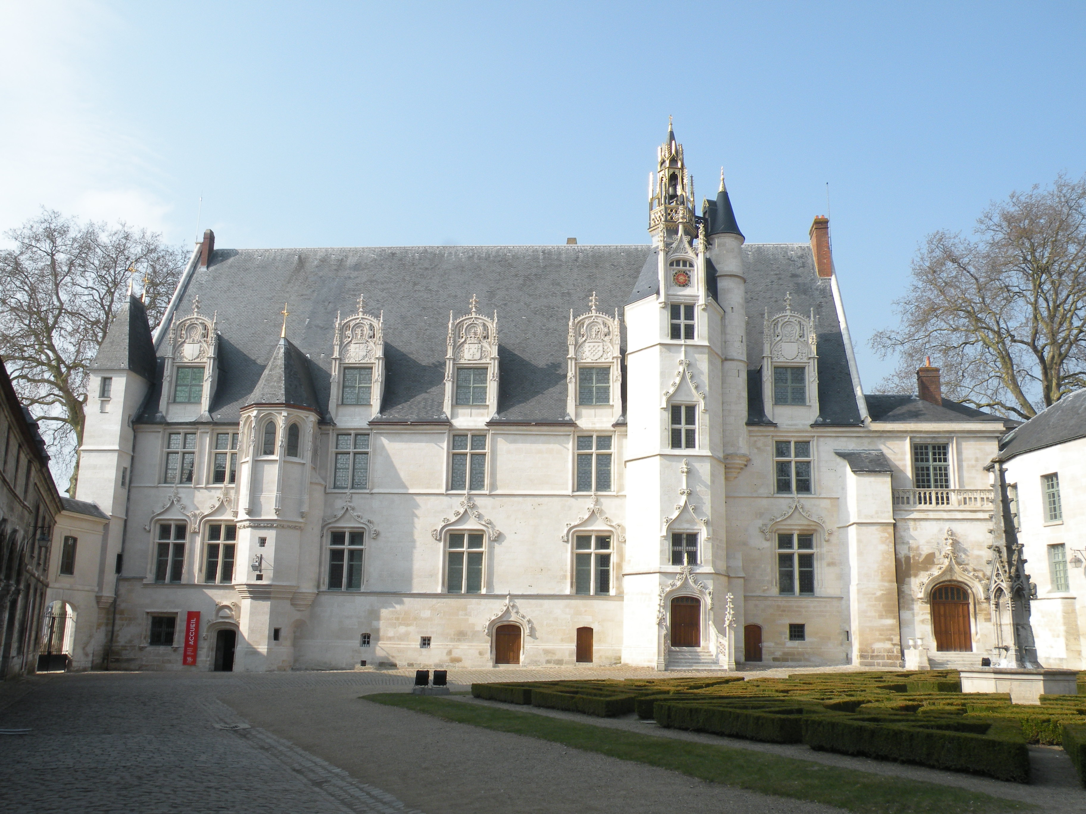 Musée départemental de l'Oise palais episcopal